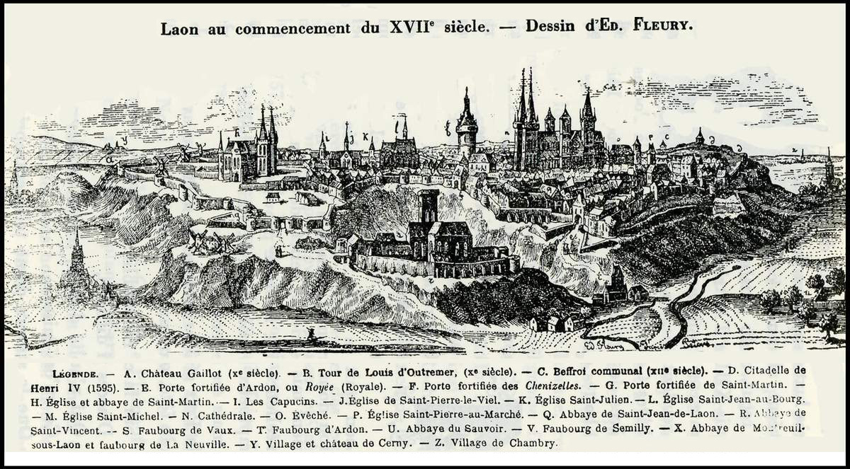 Dessin de edopuard fleury au XVIIe de Laon.